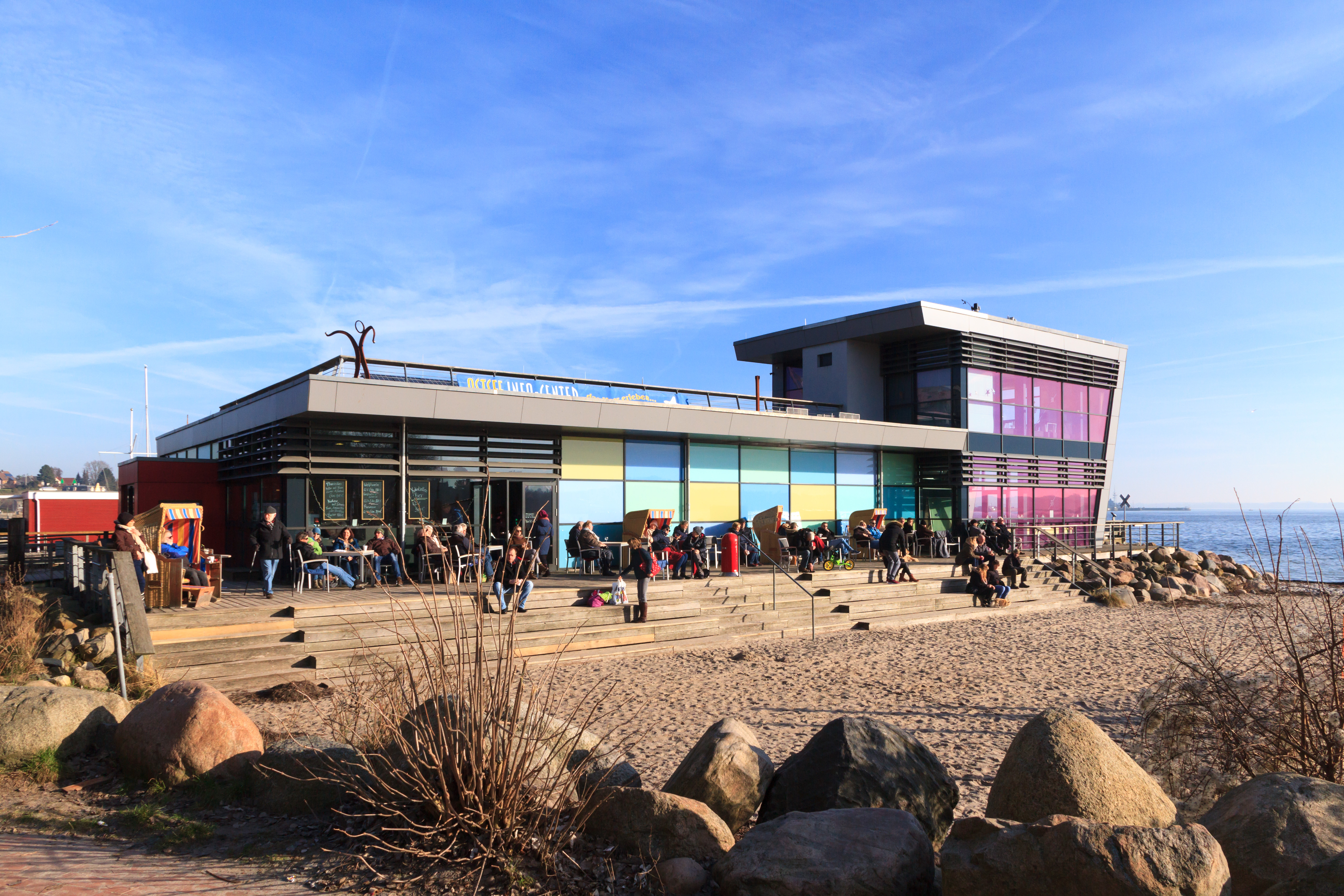 Das Ostseeinformationszentrum in Eckernförde